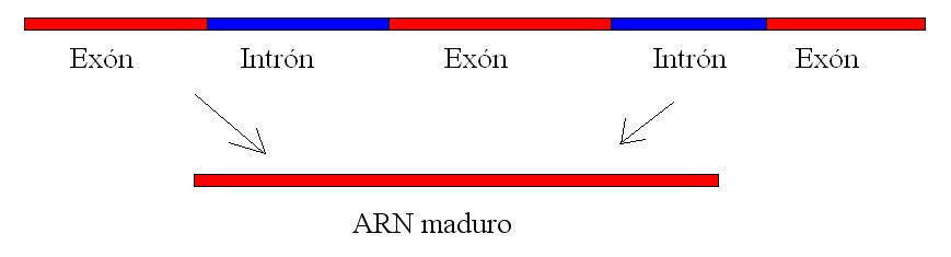 esquema sencillo de exones e intrones Traducida al español por AngelHerraez. El original en inglés (dominio público) realizado por kazulanth